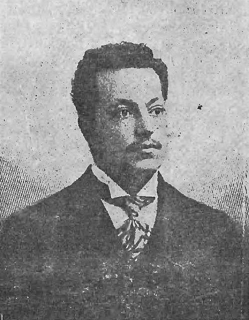 Tullio Murri (-1905)